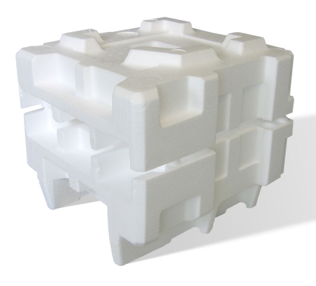 Polystyrene packaging material